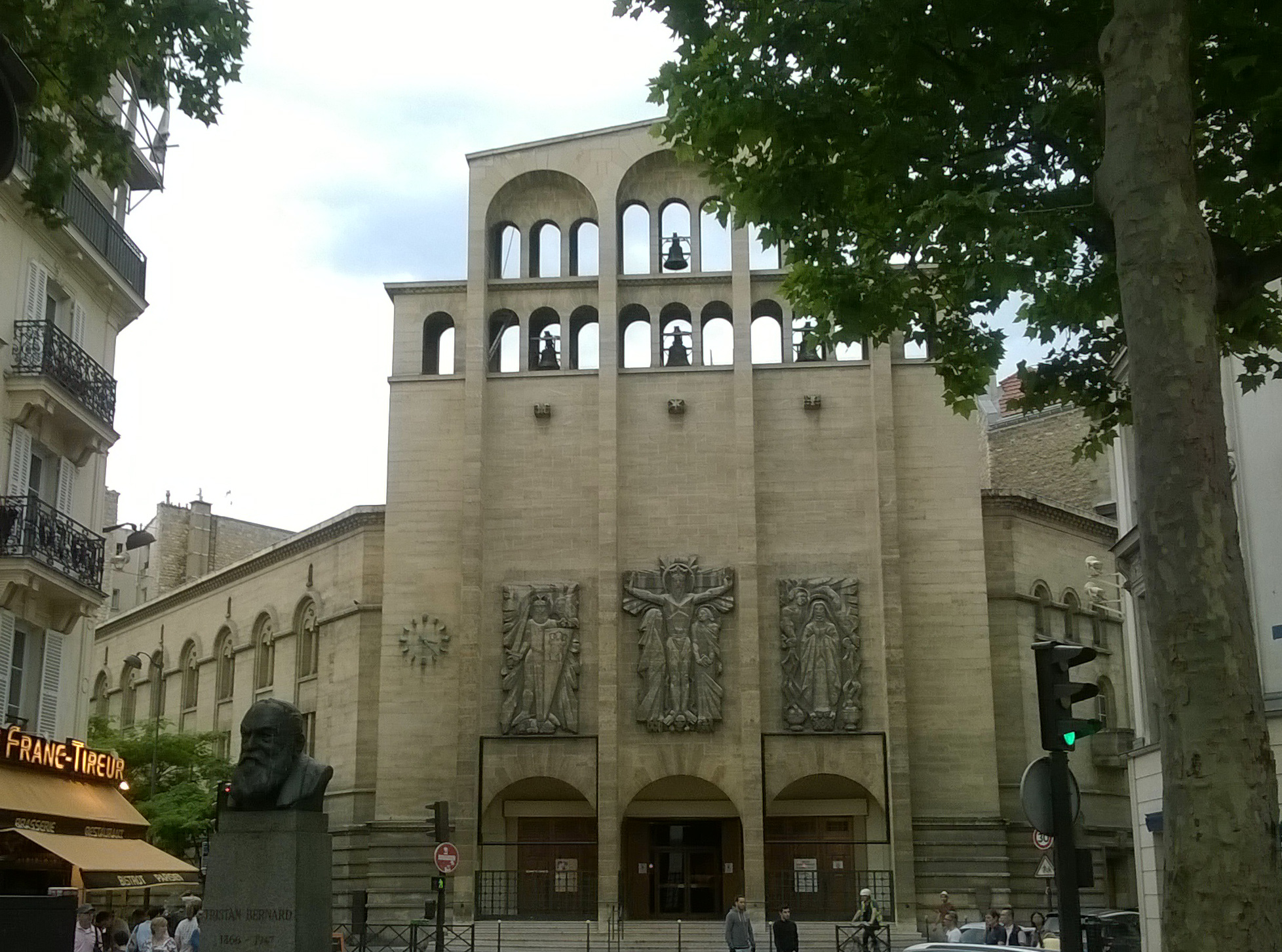 la place Tristan Bernard paris XVIIe Arrondissement devant le parvis de Saint Ferdinand des Ternes